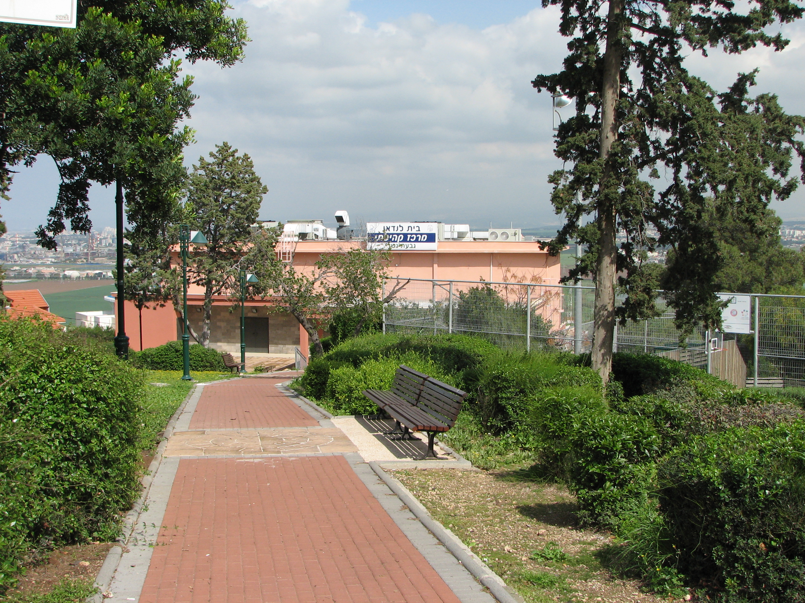 Nesher The City Nesher on Mount Carmel and Suburb:Givat Nesher תמונות משכונותיה של העיר נשר, גבעת נשר, בית לנדאו קרוי על שם אחד ממנהלי מפעל נשר. מרכז מתנ"ס בגבעה